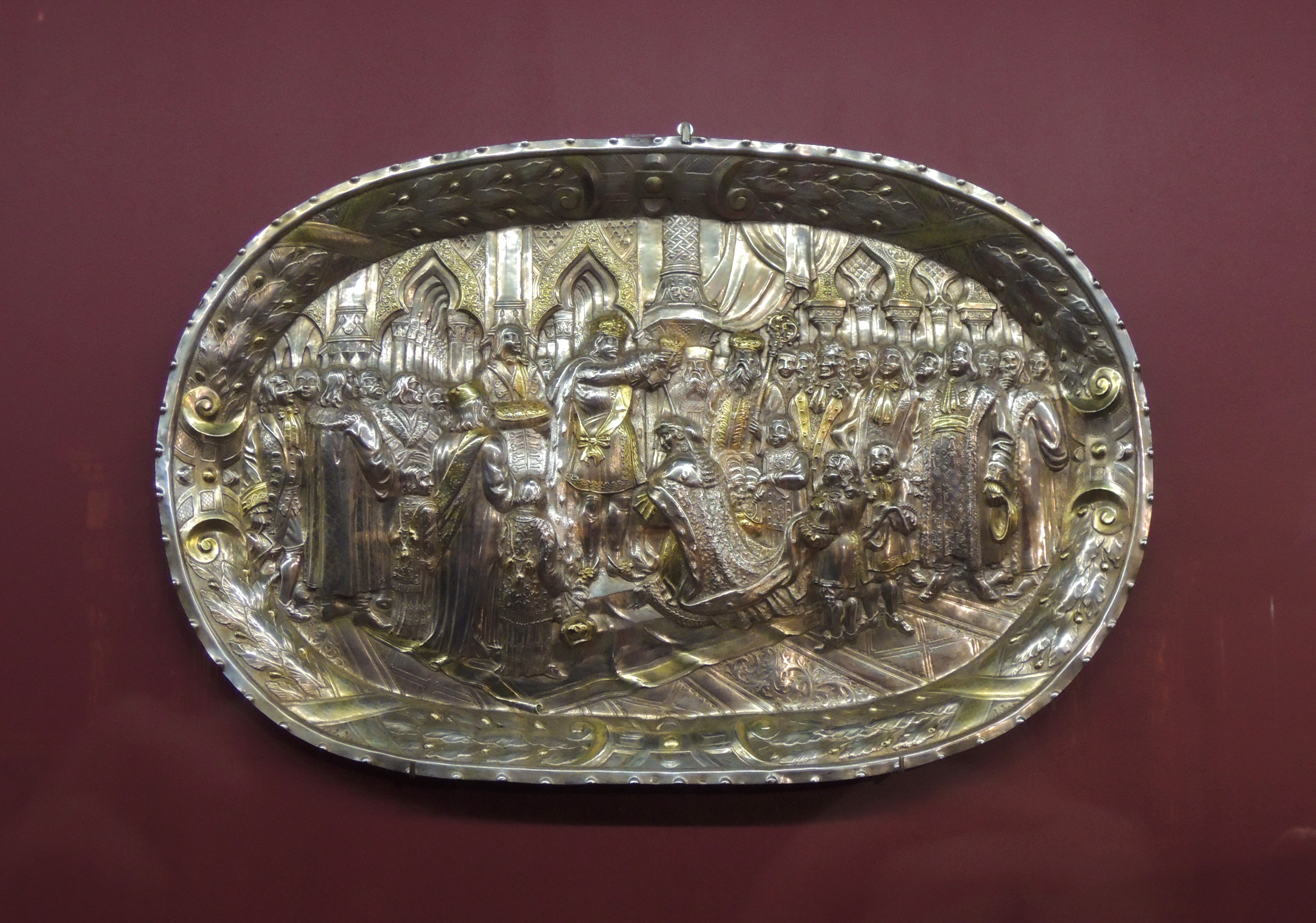 Блюдо "Коронация Екатерины I". Москва, 1724-1727. Мастер Николай Федоров. Серебро, чеканка, золочение. ММК На серебряном блюде изображен один из центральных моментов первой российской коронации, состоявшейся в Успенском соборе Московского Кремля 7 мая 1724 года: возложение Петром Великим императорской короны на жену Екатерину. Коленопреклоненная Екатерина представлена в парадном платье и отороченной горностаем мантии, которую поддерживают пажи. Мантию, впервые включенную в состав государственных регалий, выполнили специально для этой церемонии. Изображенный в руках Петра венец - первая российская императорская корона - также был создан для этой коронации. Слева за фигурой Петра изображен граф Я.В. Брюс с золоченой подушкой для короны в руках. Именно он внес новый символ монаршей власти в собор. Справа от императора два архиерея - вероятно, архиепископы Феодосий (Яновский), представленный в митре и с посохом в руках, и Феофан (Прокопович), которые подносят Петру коронационную мантию для возложения на Екатерину